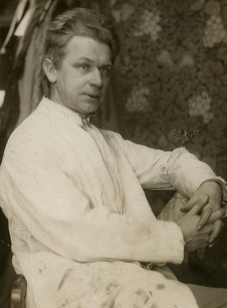 portrett, mann, billedhugger, professor, sittende halvfigur.